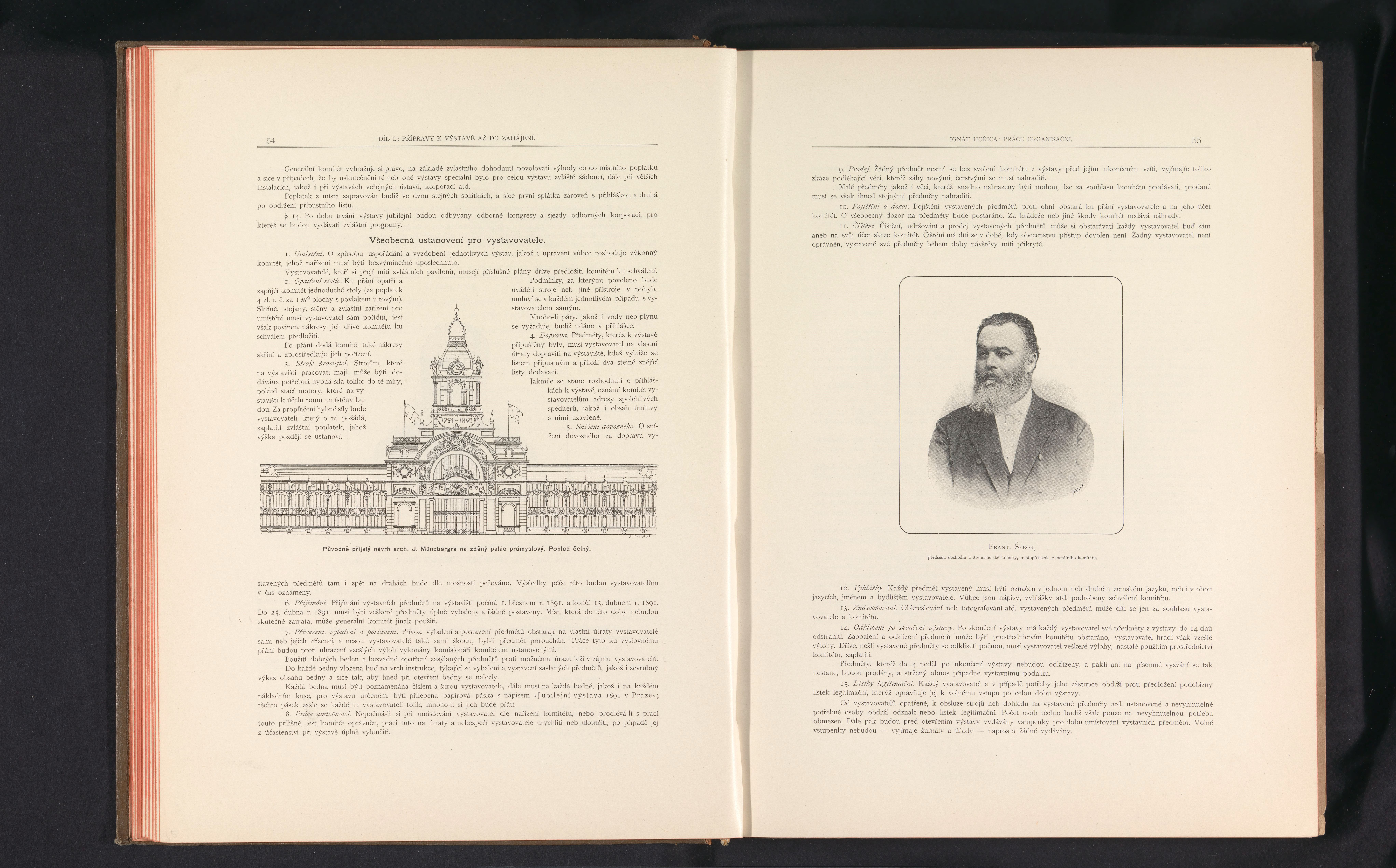 IdentificatieTitel(s): Portret van František ŠeborFrant. Šebor (titel op object)Objecttype: fotomechanische afdruk bladzijde Objectnummer: RP-F-2001-7-749A-16VervaardigingVervaardiger: fotograaf: anoniemclichémaker: Carl BellmannPlaats vervaardiging: PraagDatering: ca. 1888 - in of voor 1893Materiaal: papier Techniek: autotypieAfmetingen: prent: h 105 mm × b 83 mmToelichtingPrent op pagina 55.OnderwerpWat: adult manWie: František ŠeborVerwerving en rechtenCredit line: Aankoop met steun van de Mondriaan Stichting, het Prins Bernhard Cultuurfonds, het VSBfonds, het Paul Huf Fonds/Rijksmuseum Fonds en het Egbert KunstfondsVerwerving: aankoop 2001Copyright: Publiek domein